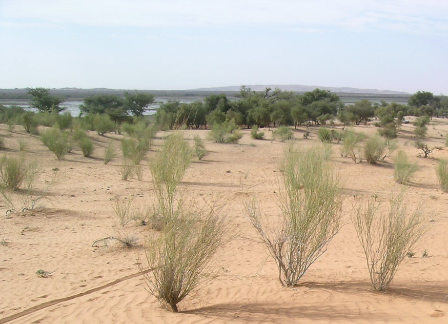 Mare D'Oursi in der Sahel,Nord-Burkina, 40-50 Km N-W von Gorom-Gorom